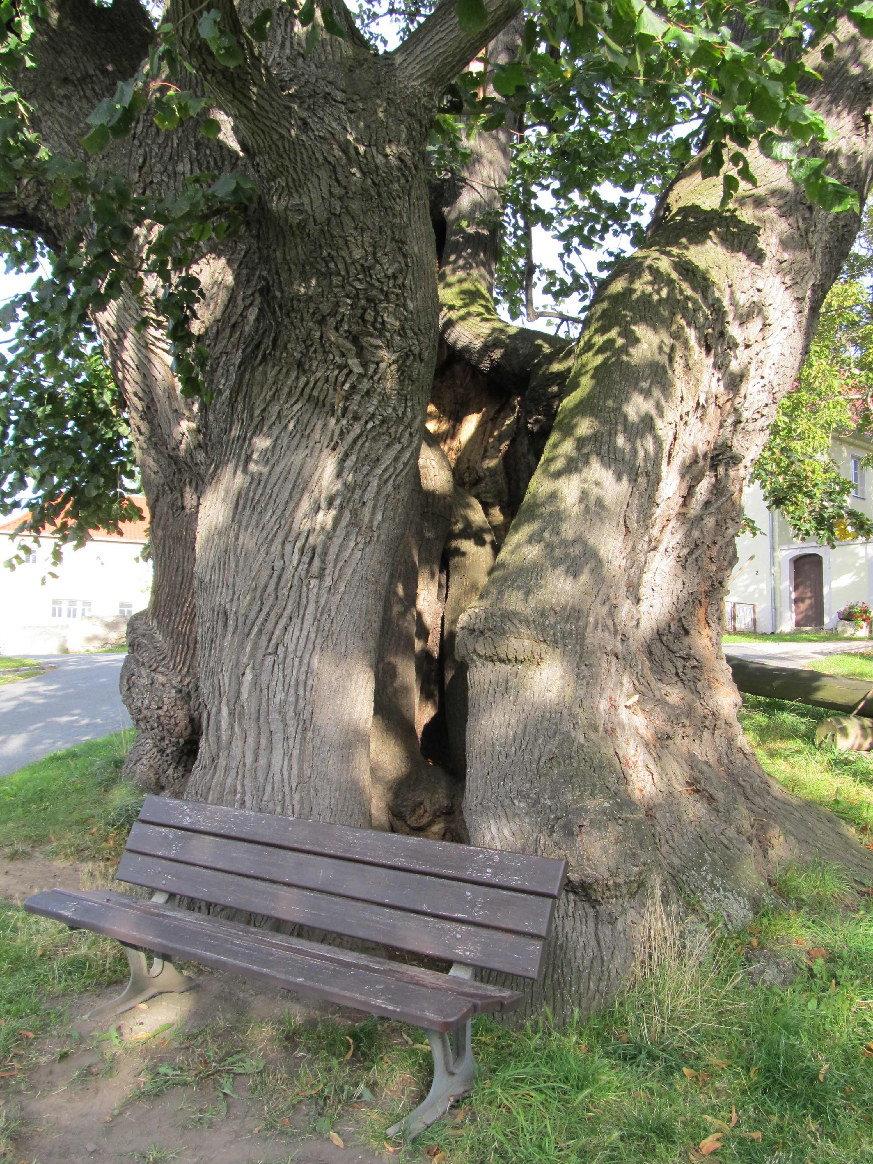 Schmorsdorfer Linde, Stamm